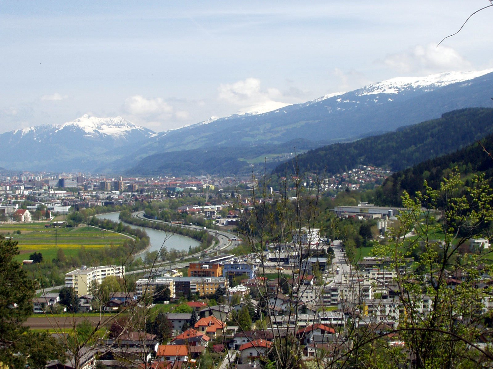 Blick vom Blasiusberg auf Völs (rechts vorne) und Innsbruck(links hinten).